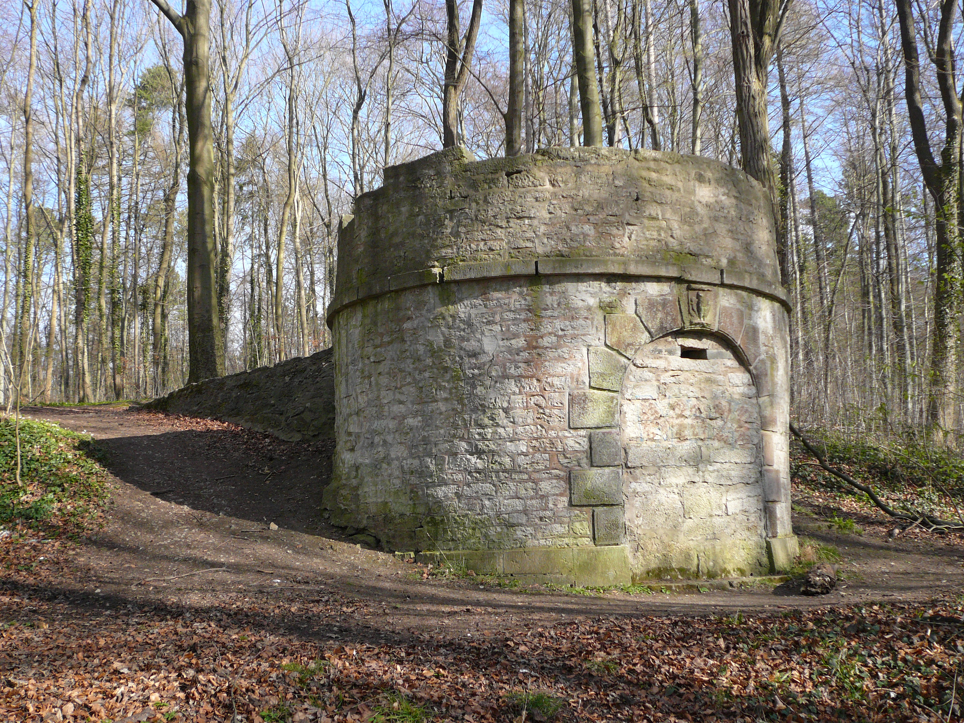 Eulenturm am Hainberg östlich von Göttingen